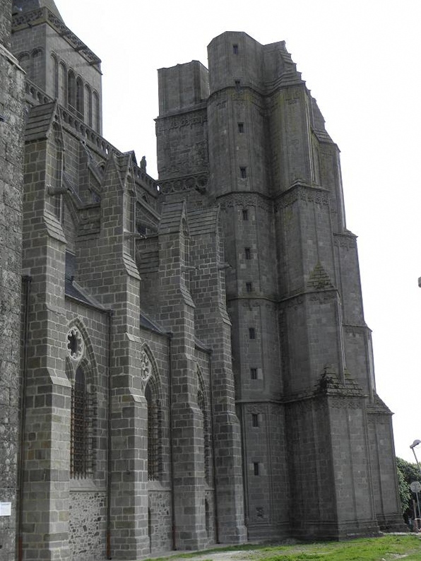 Vue de la face orientale de la tour nord de la façade occidentale de la cathédrale Saint-Samson de Dol-de-bretagne (35).